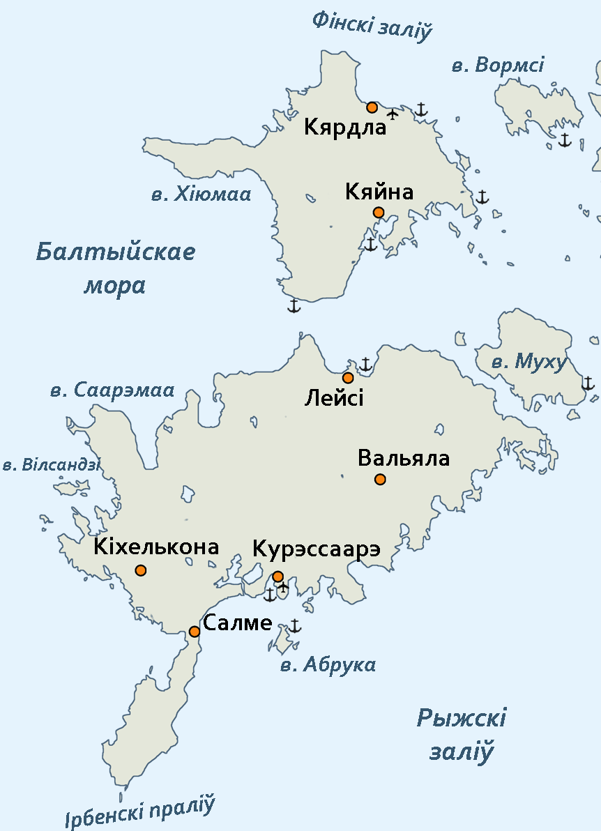 Заходні Эстонскі архіпелаг, карта